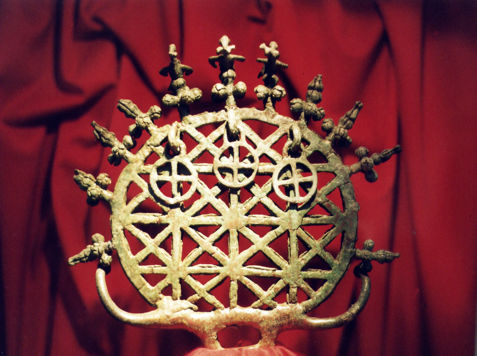 Museum für anatolische Zivilisationen, Ankara, Türkei Sonnenscheibe aus Alacahöyük